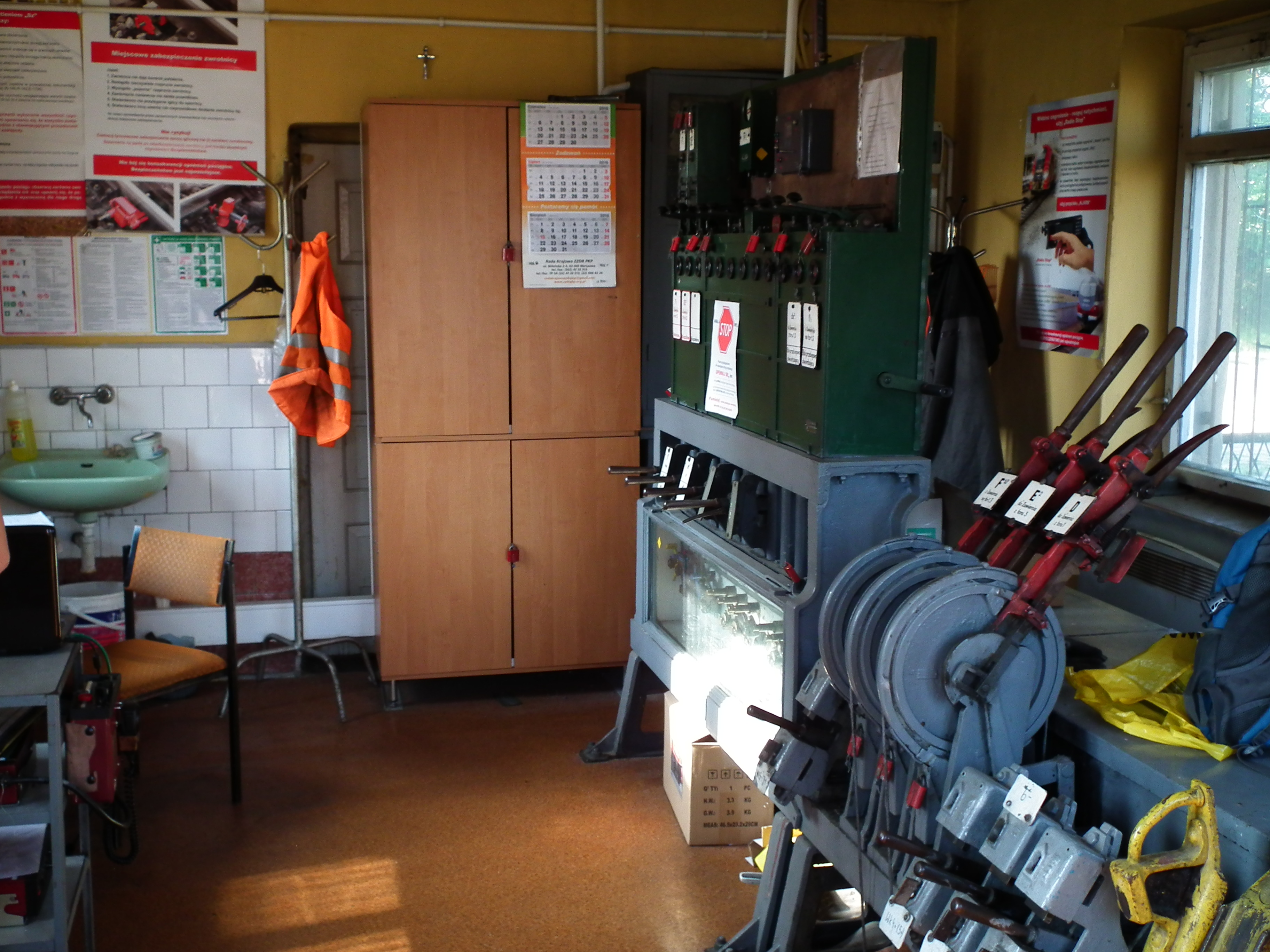 Impreza kolejowa pt. Zagłębiowskie Zakamarki, zorganizowana w dniu 2.7.2016r. na liniach Zagłębia Dąbrowskiego i obsługiwana przez SA138-005. Stacja w Siewierzu.